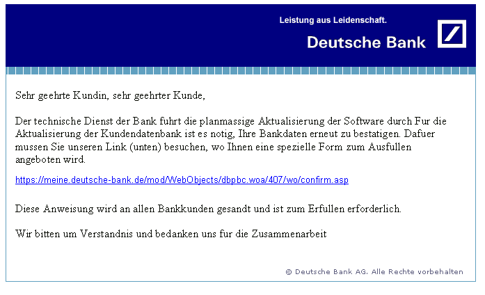 Phishing-E-Mail im Deutsche Bank-Design